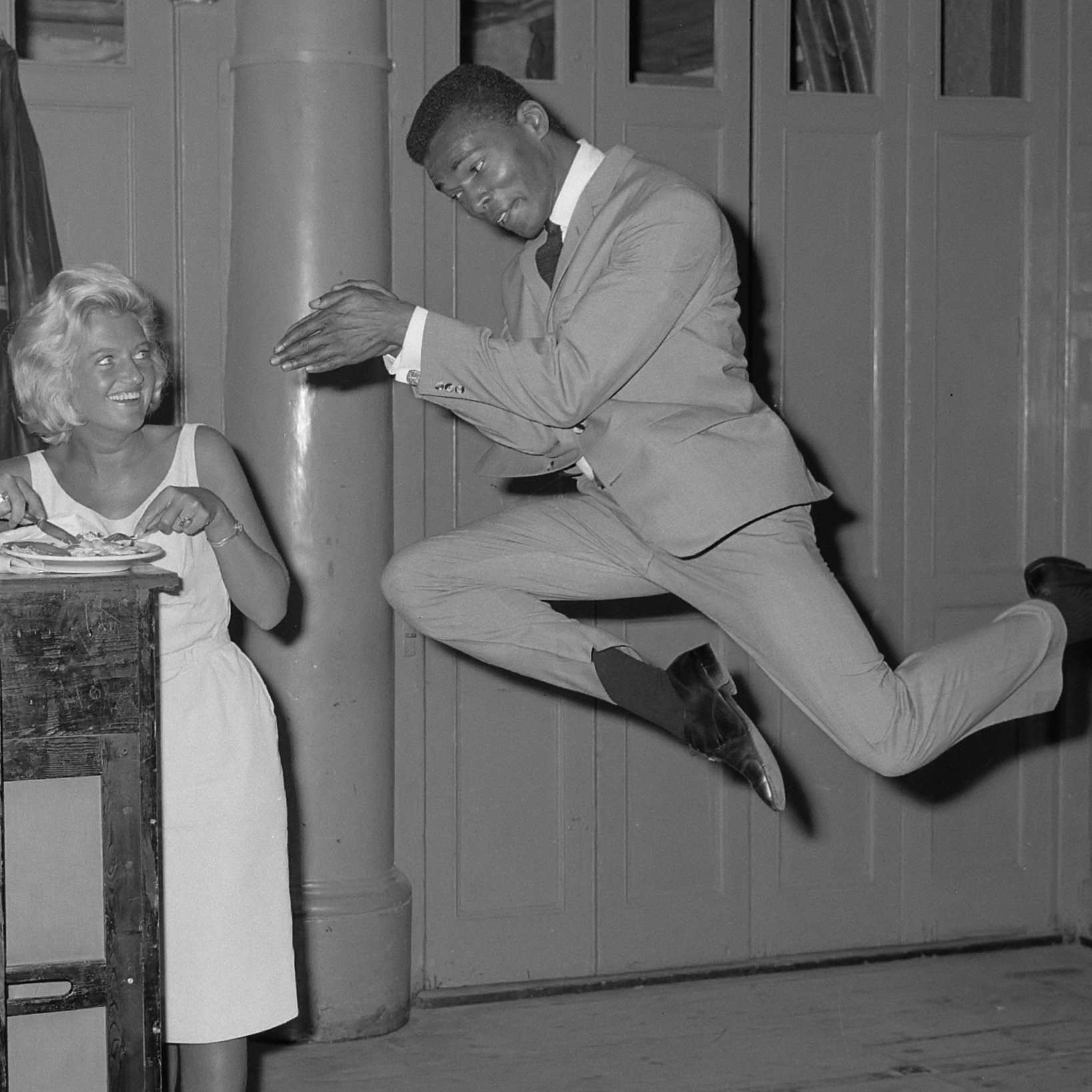 Samen uit" nieuwe Snip en Snap revue; Mieke Telkamp en Donald Jones 15 juni 1964